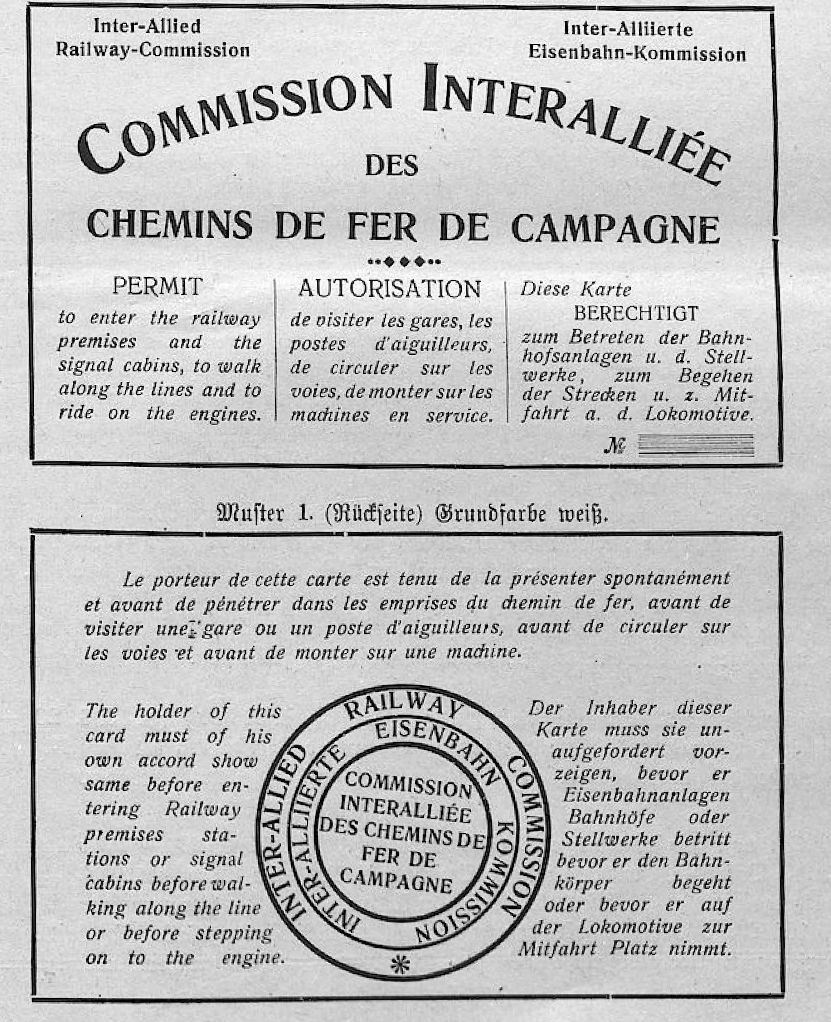 Berechtigungskarte für Mitarbeiter der Interalliierten Feldeisenbahn-Kommission zum Betreten von Bahnanlagen im besetzten Gebiet (1920). Quelle: Preußische und Hessische Eisenbahndirektion in Mainz (Hg.): Amtsblatt der Preußischen und Hessischen Eisenbahndirektion in Mainz vom 21. August 1920, Nr. 50. Bekanntmachung Nr. 814, S. 449.